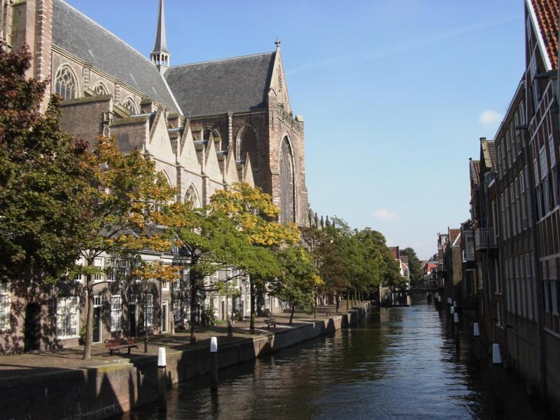 Dordrecht (Nederland). Voorstraathaven met Pottenkade links, langs de Grote of Onze-Lieve-Vrouwekerk. Self made photograph.